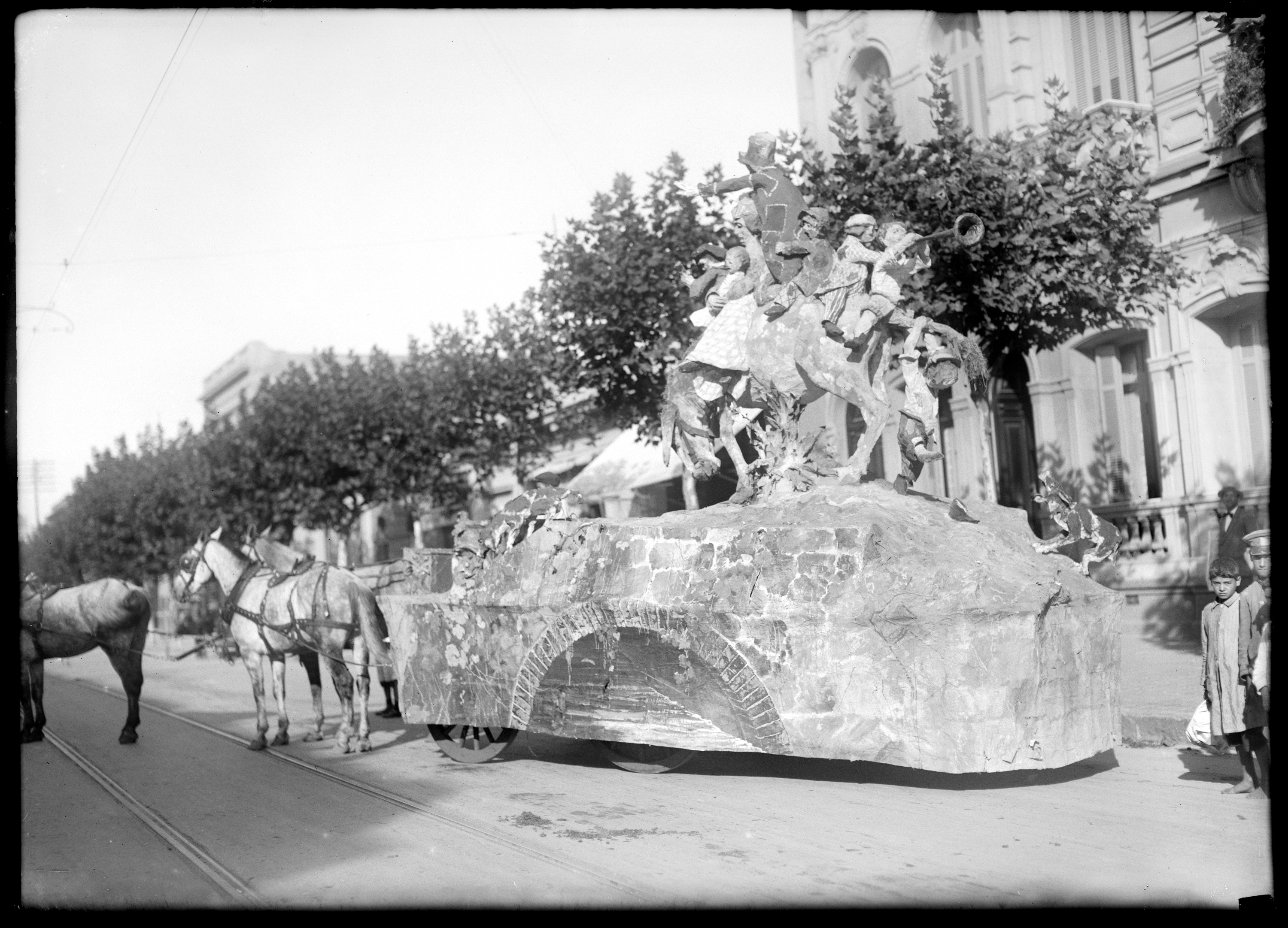 Carro alegórico de Carnaval (Montevideo, Uruguay)